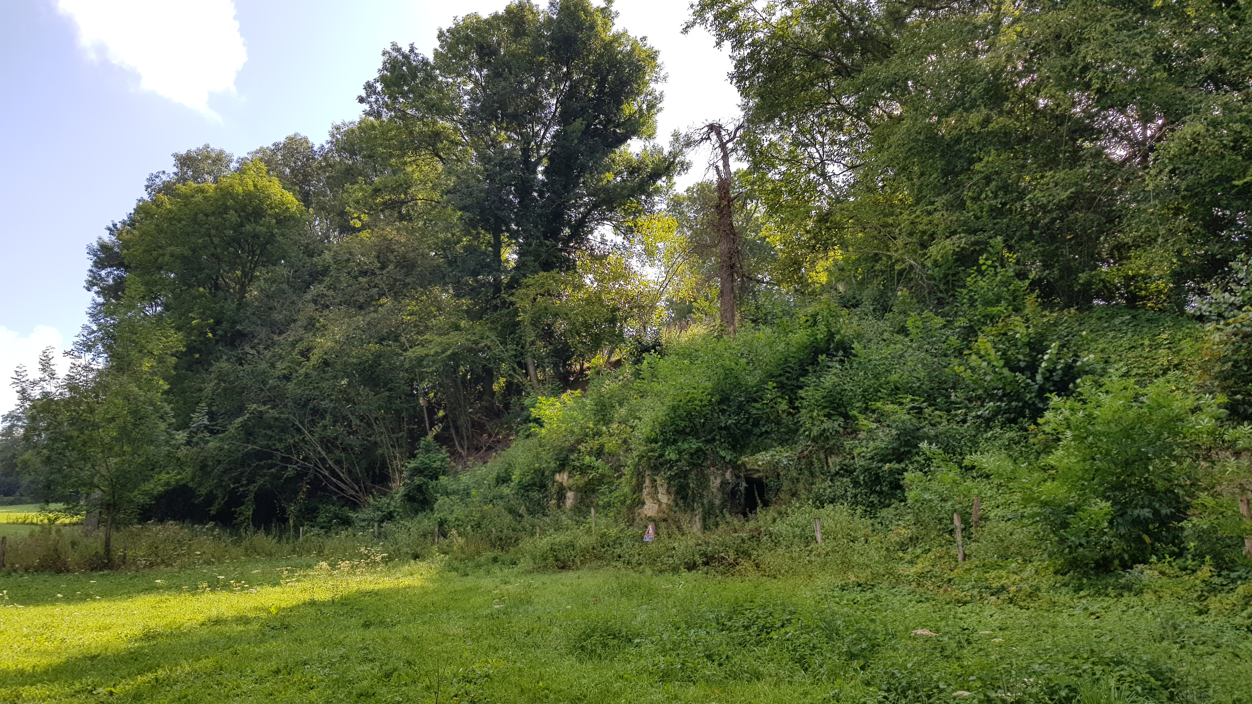 Schoorberggroeve II, Bemelen, Nederland